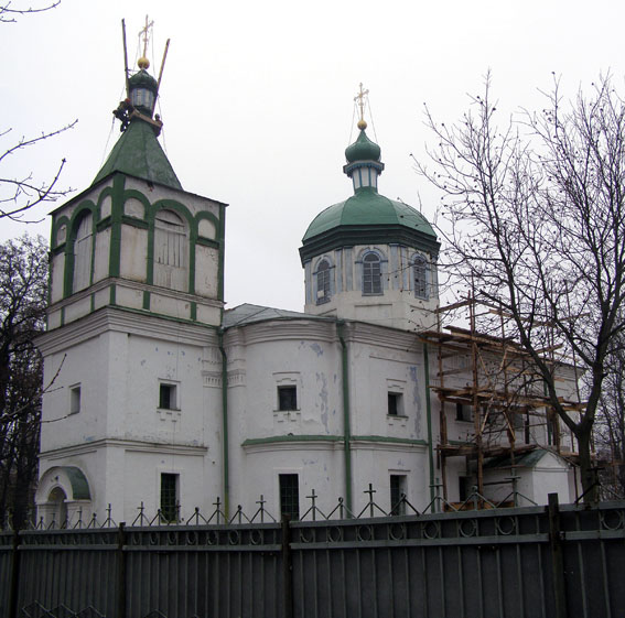 Троїцька церква у Переяслав-Хмельницькому